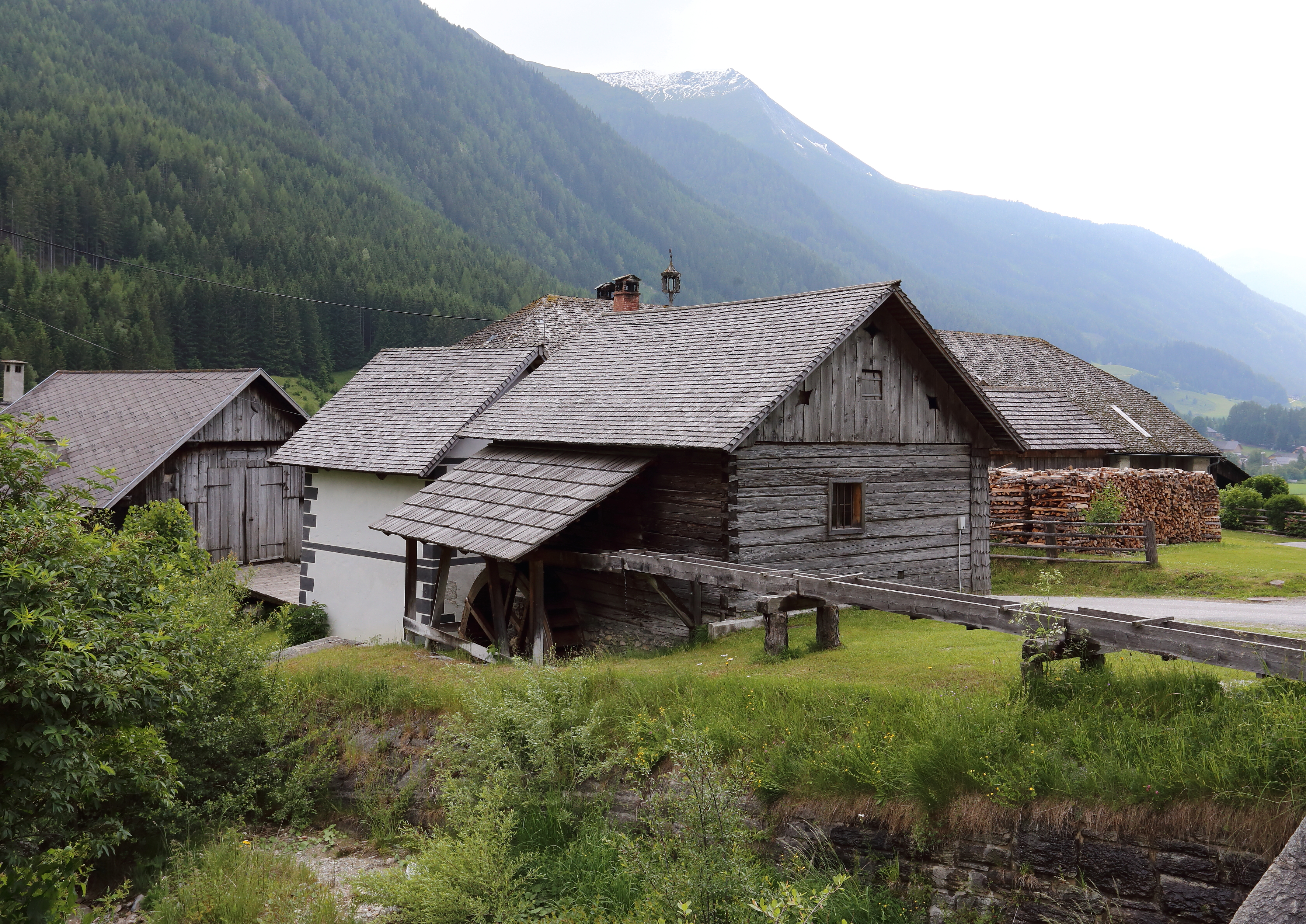 Die Jakobermühle in der Salzburger Gemeinde Zederhaus.